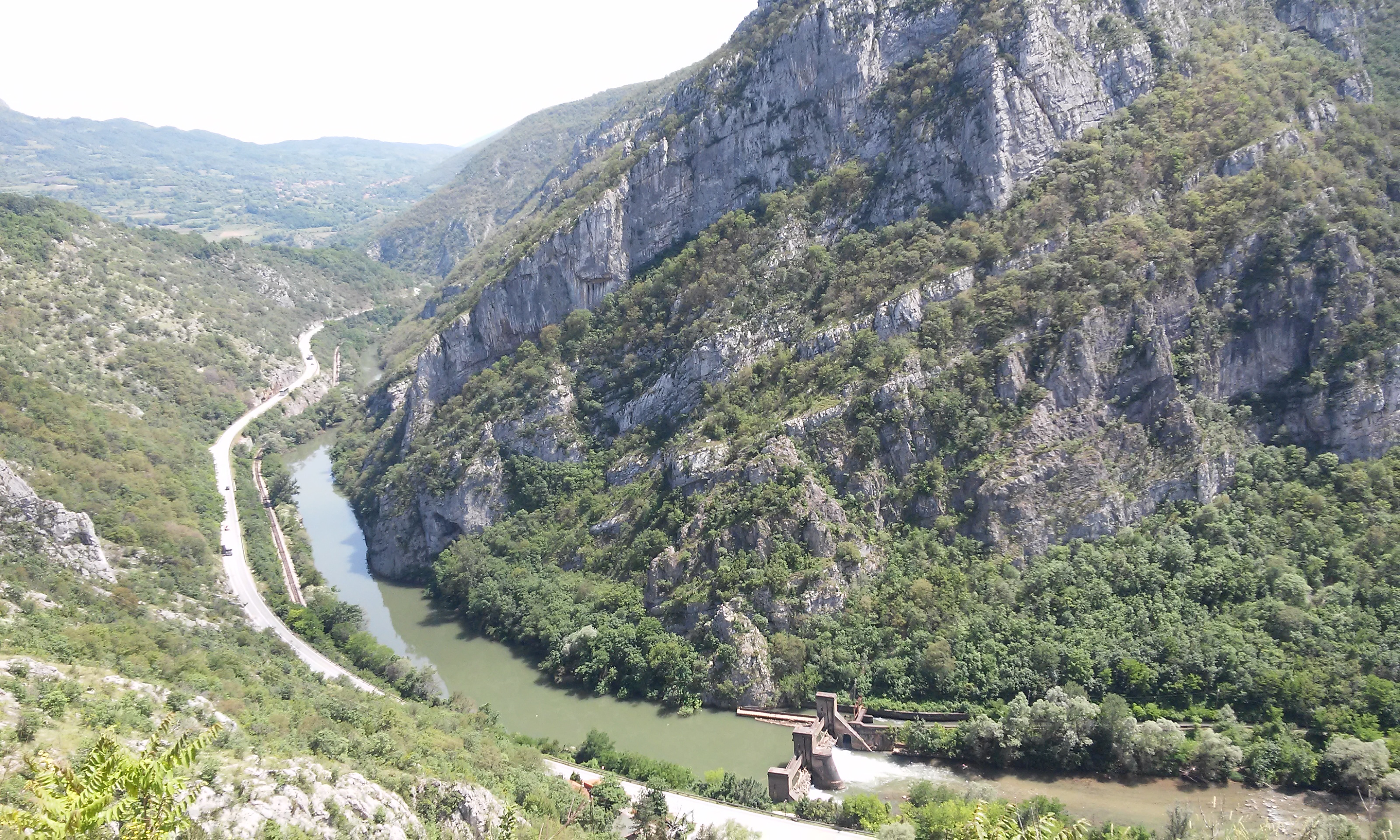 Srpski (latinica): Sićevačka klisura